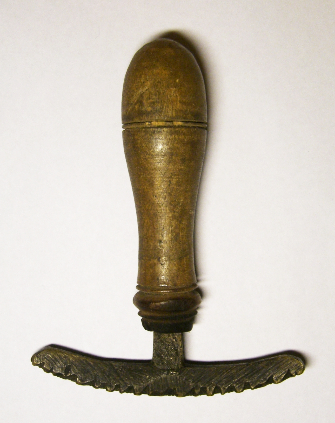 Filete (um 1900)